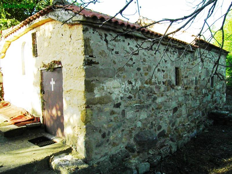 Цркава Св. Никола во Крупиште